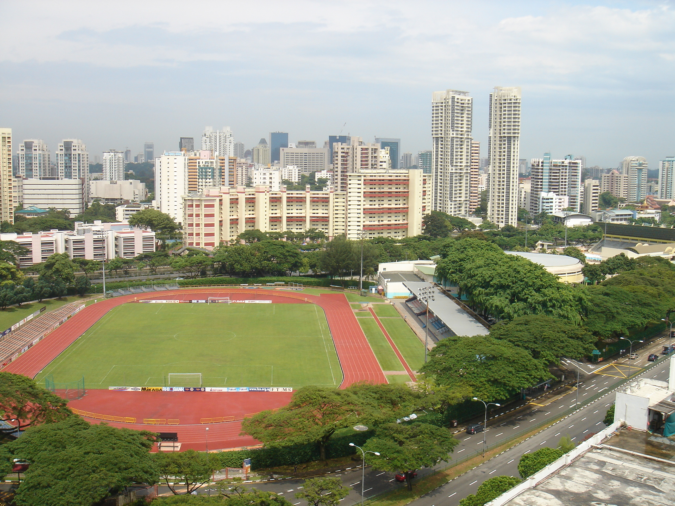 Toa Payoh Stadium, Toa Payoh, Singapore.